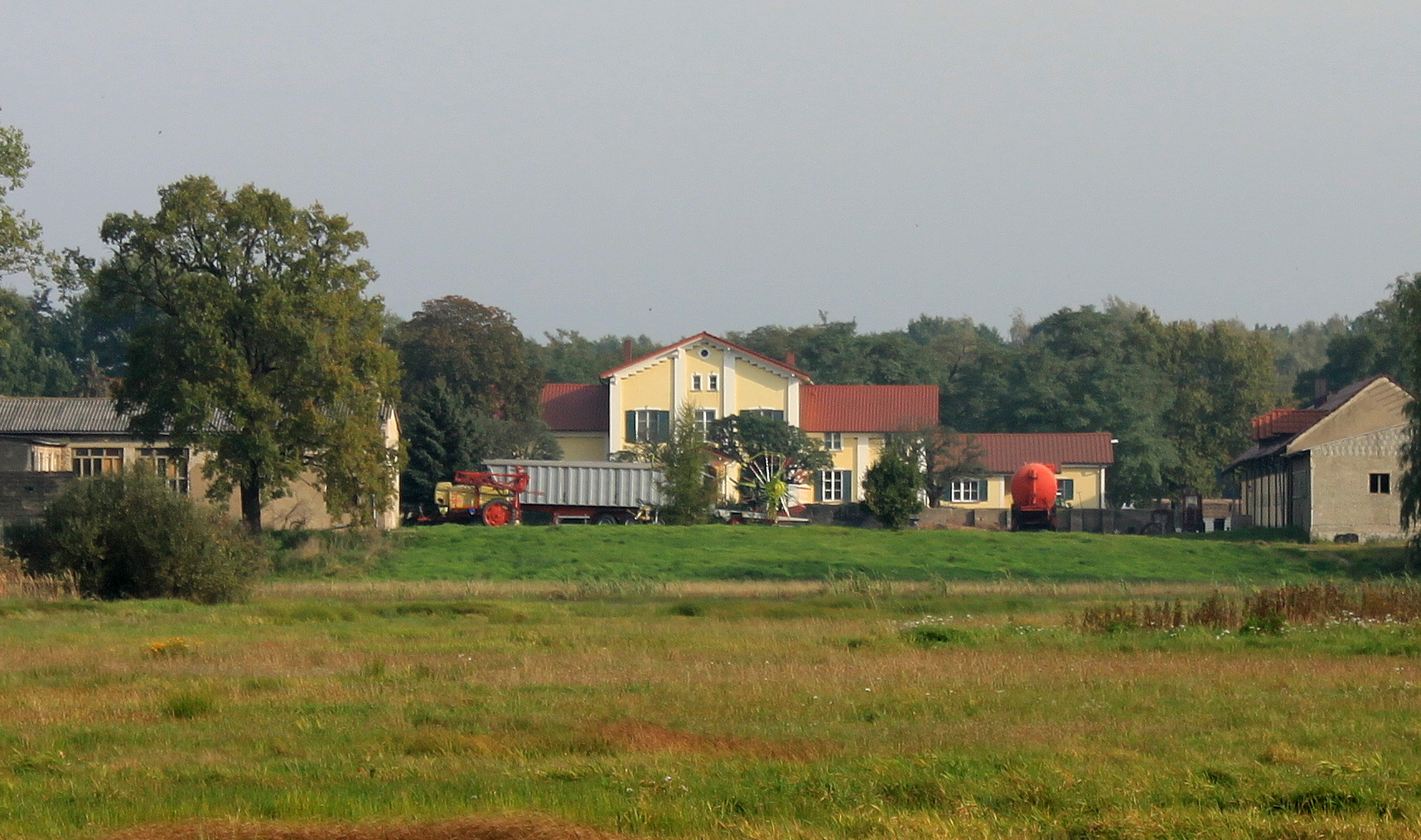 Gut in Prieschka vom Weg aus.